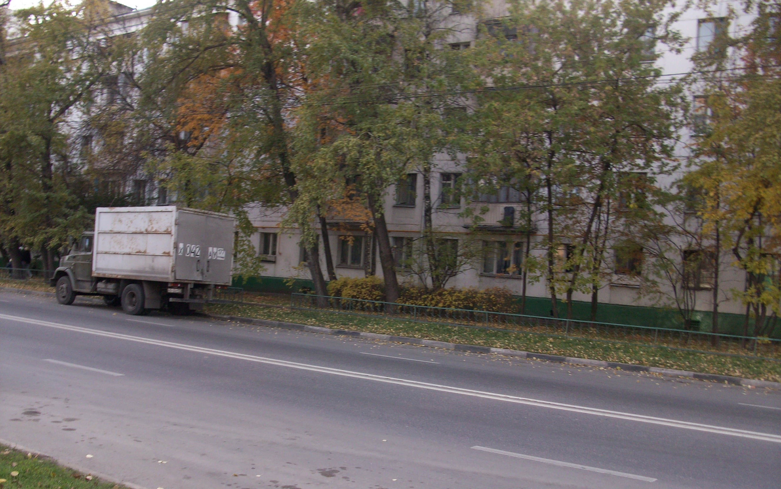 Вид на Коровинское шоссе в Москве.